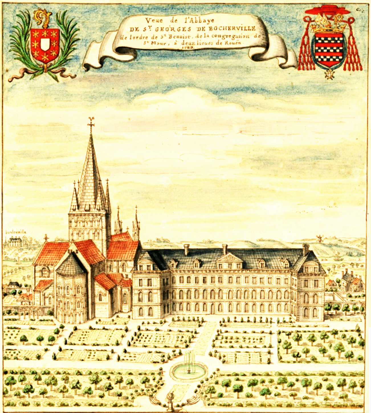 Abbaye Saint-Georges de Boscherville, vue en 1700 (image du domaine public modifiée)